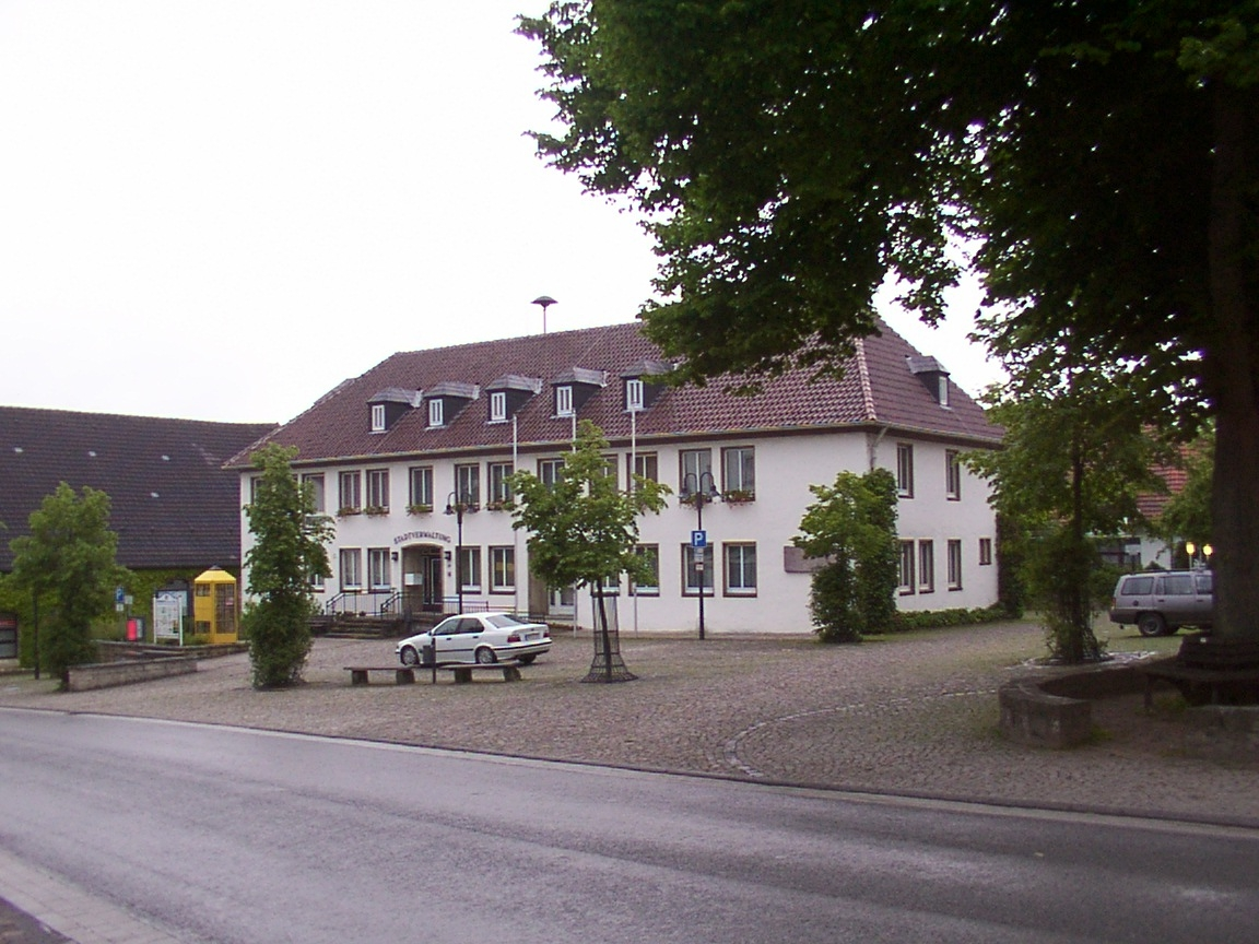 Lichtenau (Westfalen): Rathaus